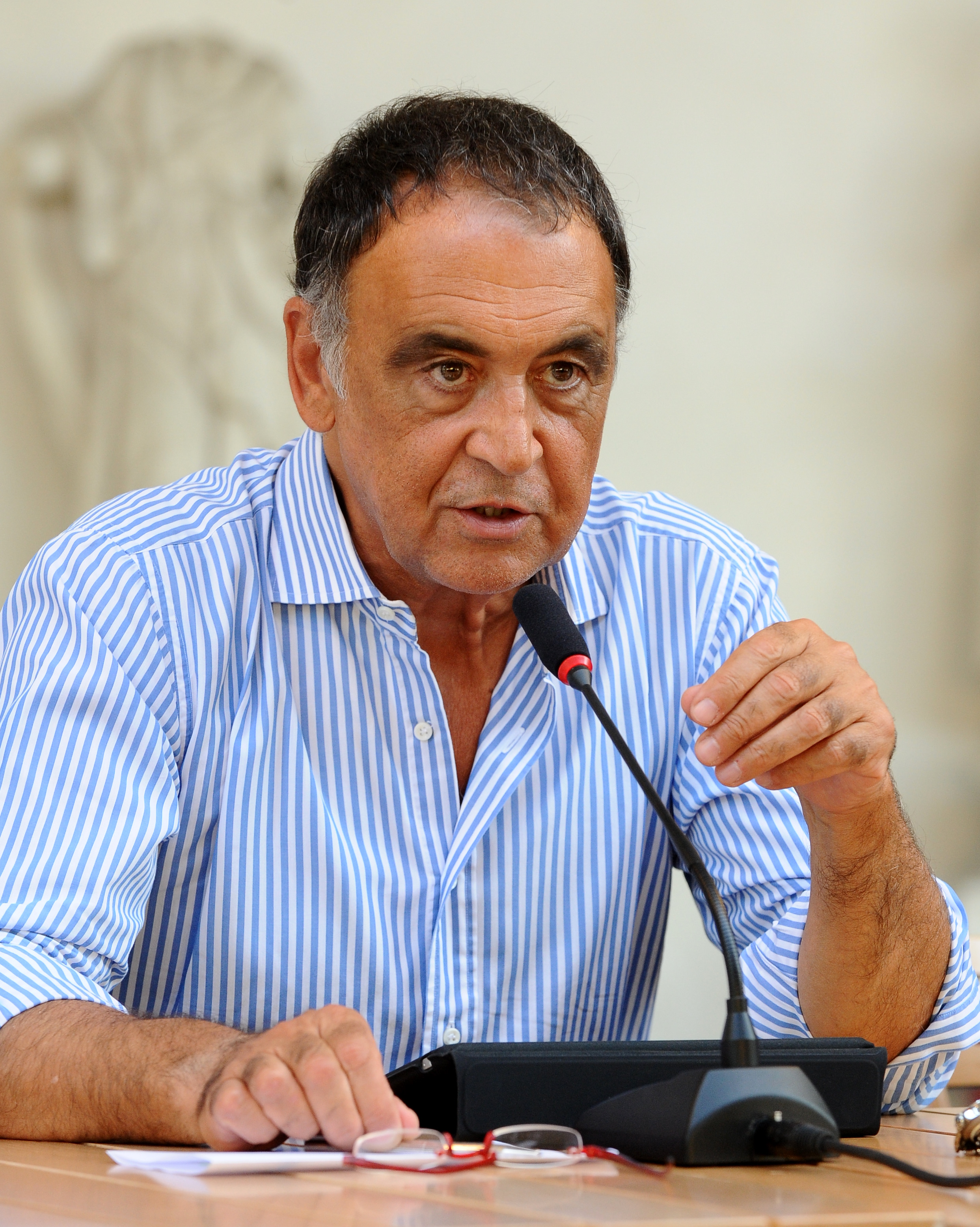 Bruno Manfellotto a Mantova per il Festivaletteratura 2012.